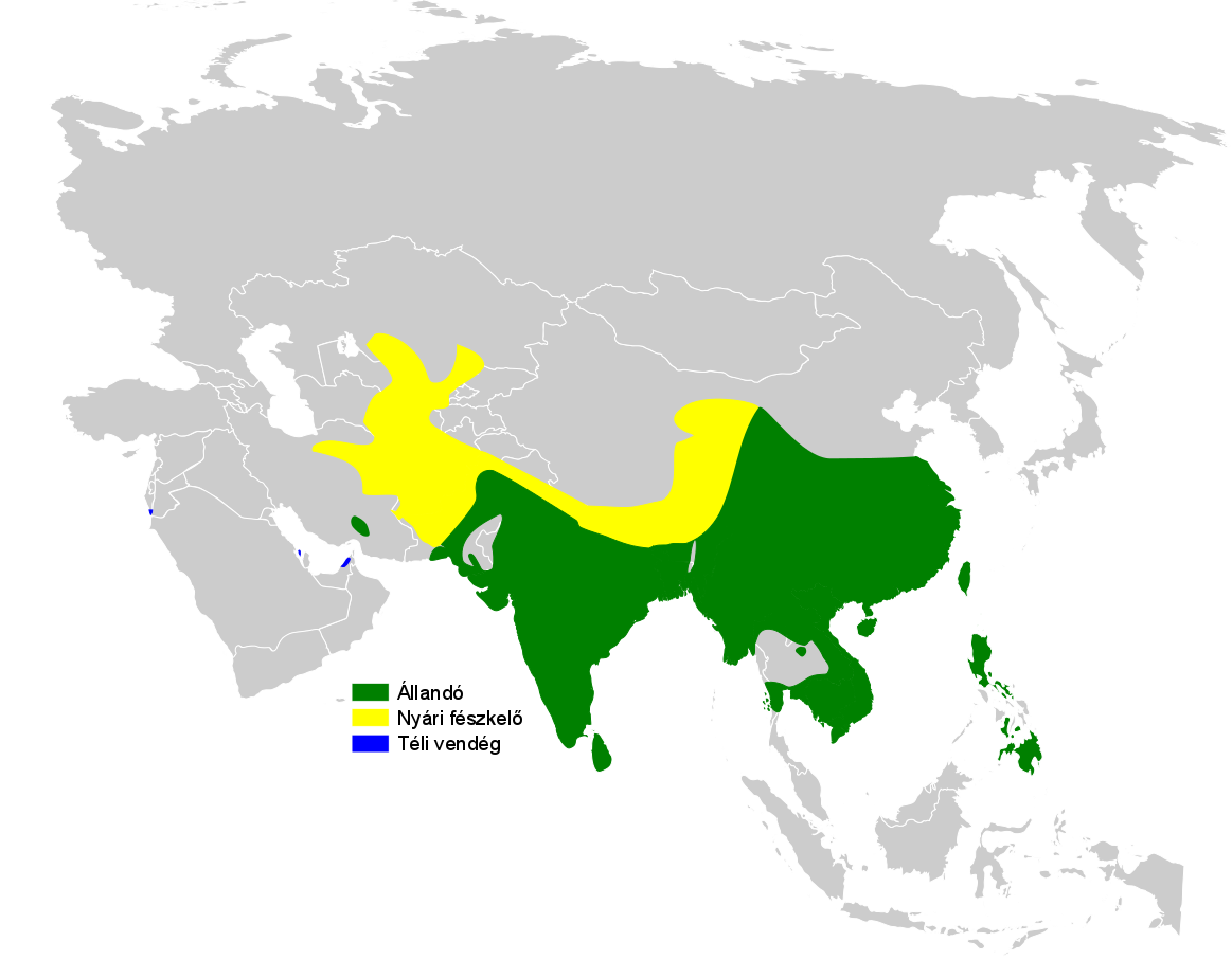 Alauda gulgula distribution map, based on